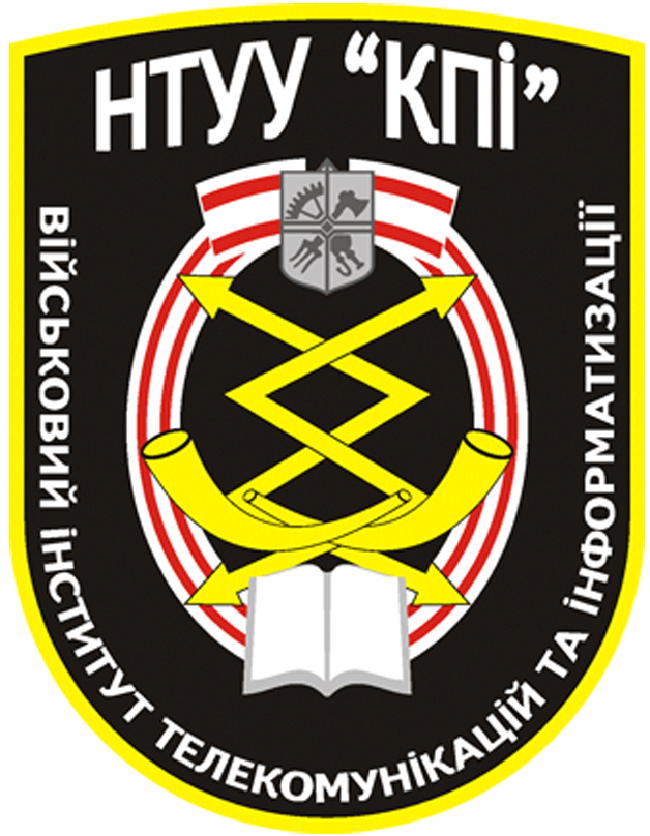 Емблема, Військовий інститут телекомунікацій та інформатизації НТУУ КПІ